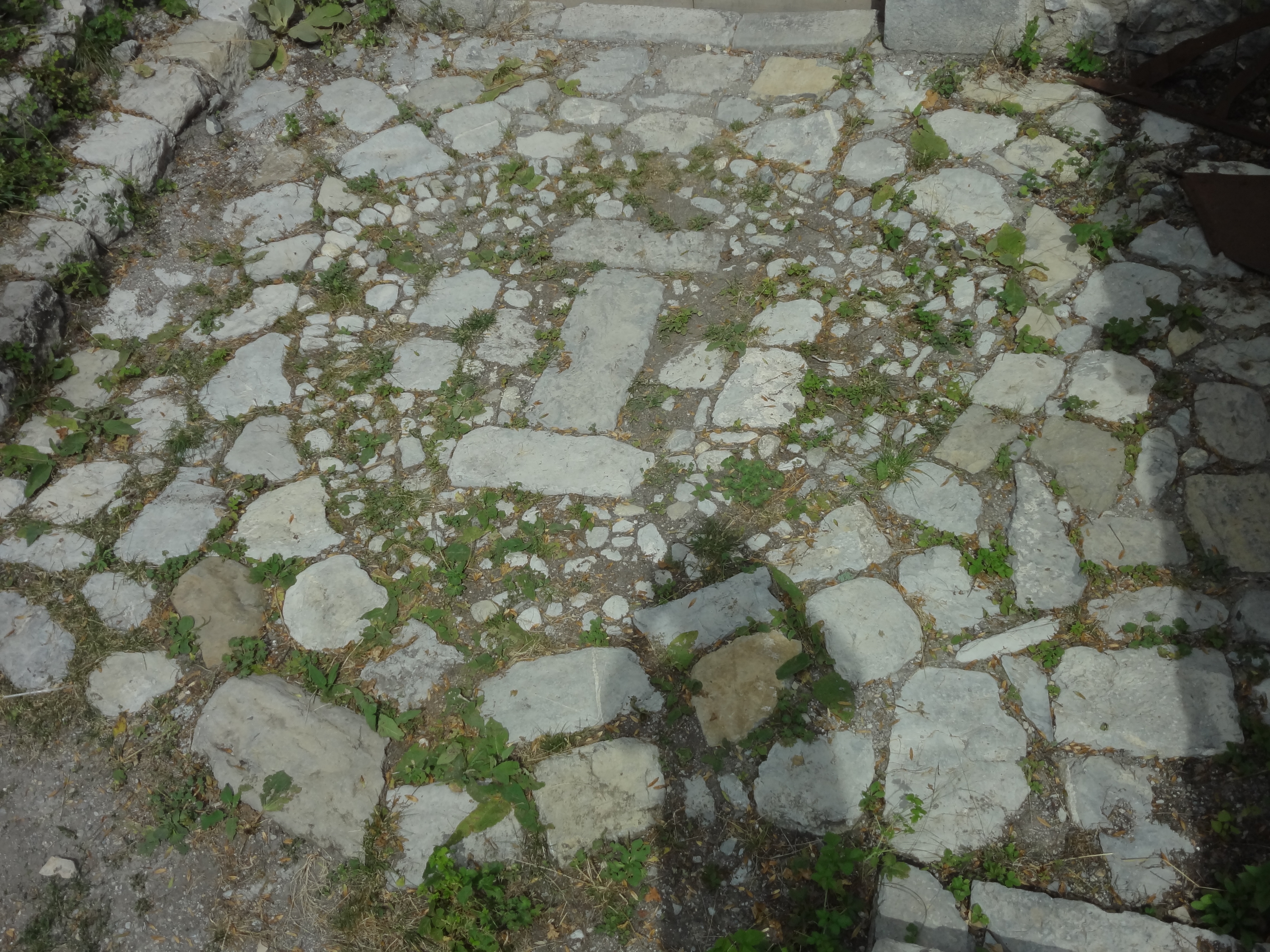 Dallage formant une croix potencée devant le portail occidental de l’église Saint-Étienne de Mariaud, Alpes-de-Haute-Provence.